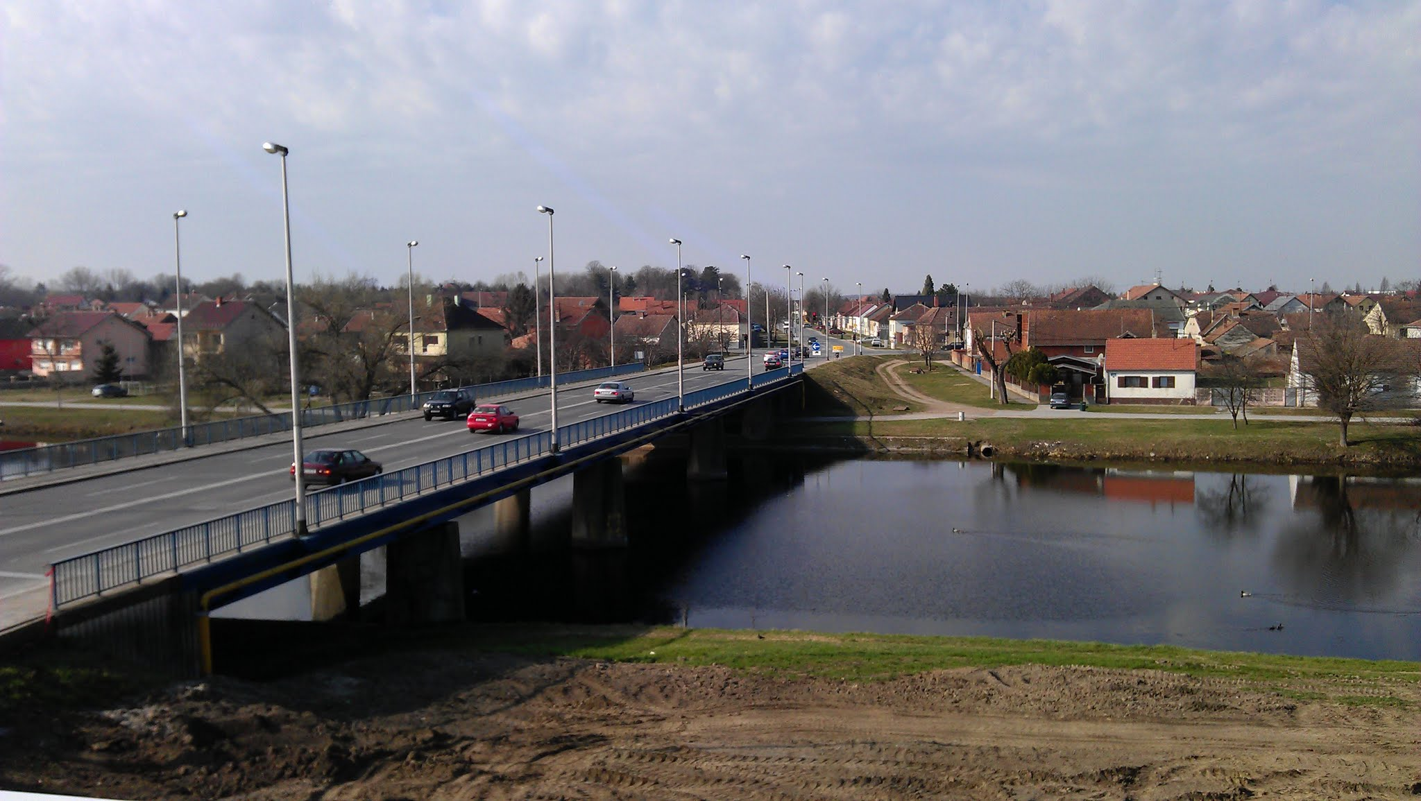 bosut